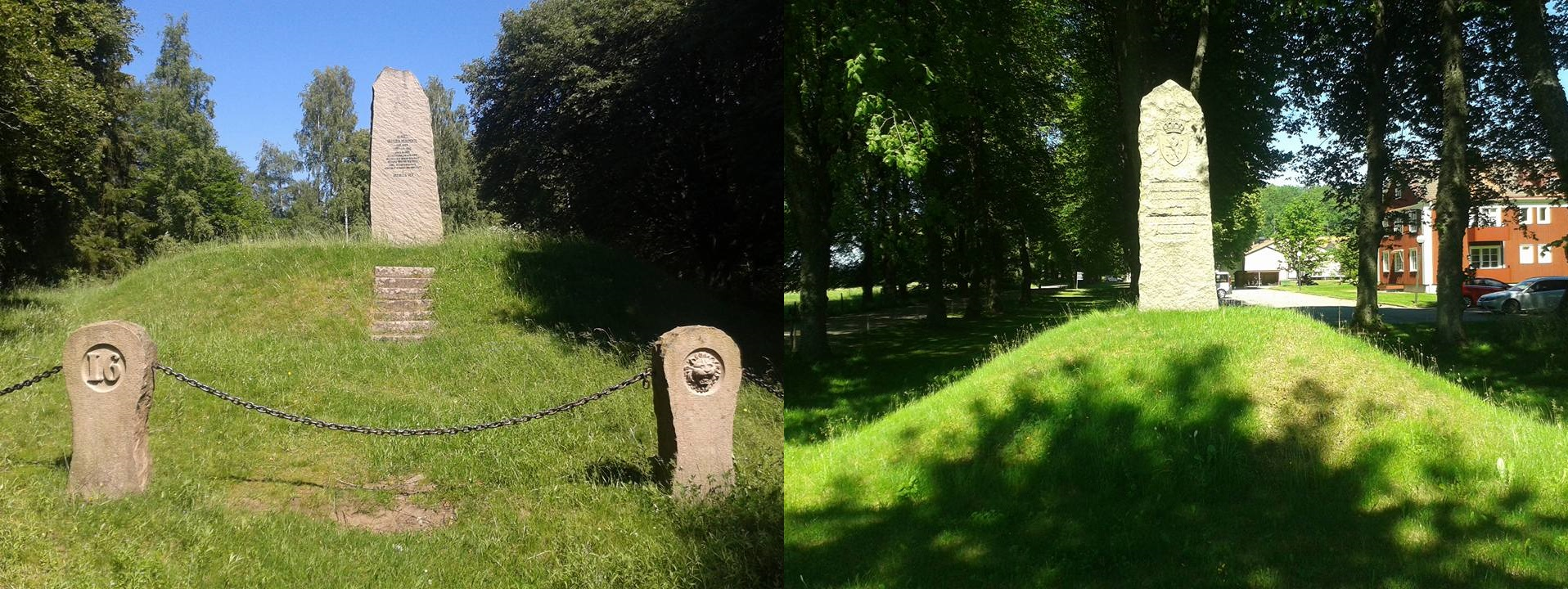 Axevalla hed är ett öppet hedlandskap mellan Husgärdessjön och samhället Axvall i Skärvs socken i Skara kommun, Västergötland. Heden användes som tillfällig övningsplats för Skaraborgs regemente första gången 1696 och från 1725 var den regementets permanenta övningsplats. År 1913 flyttade Skaraborgarna in till Skövde. Även Västgöta regemente övade på heden tills de 1916 flyttade till Vänersborg.